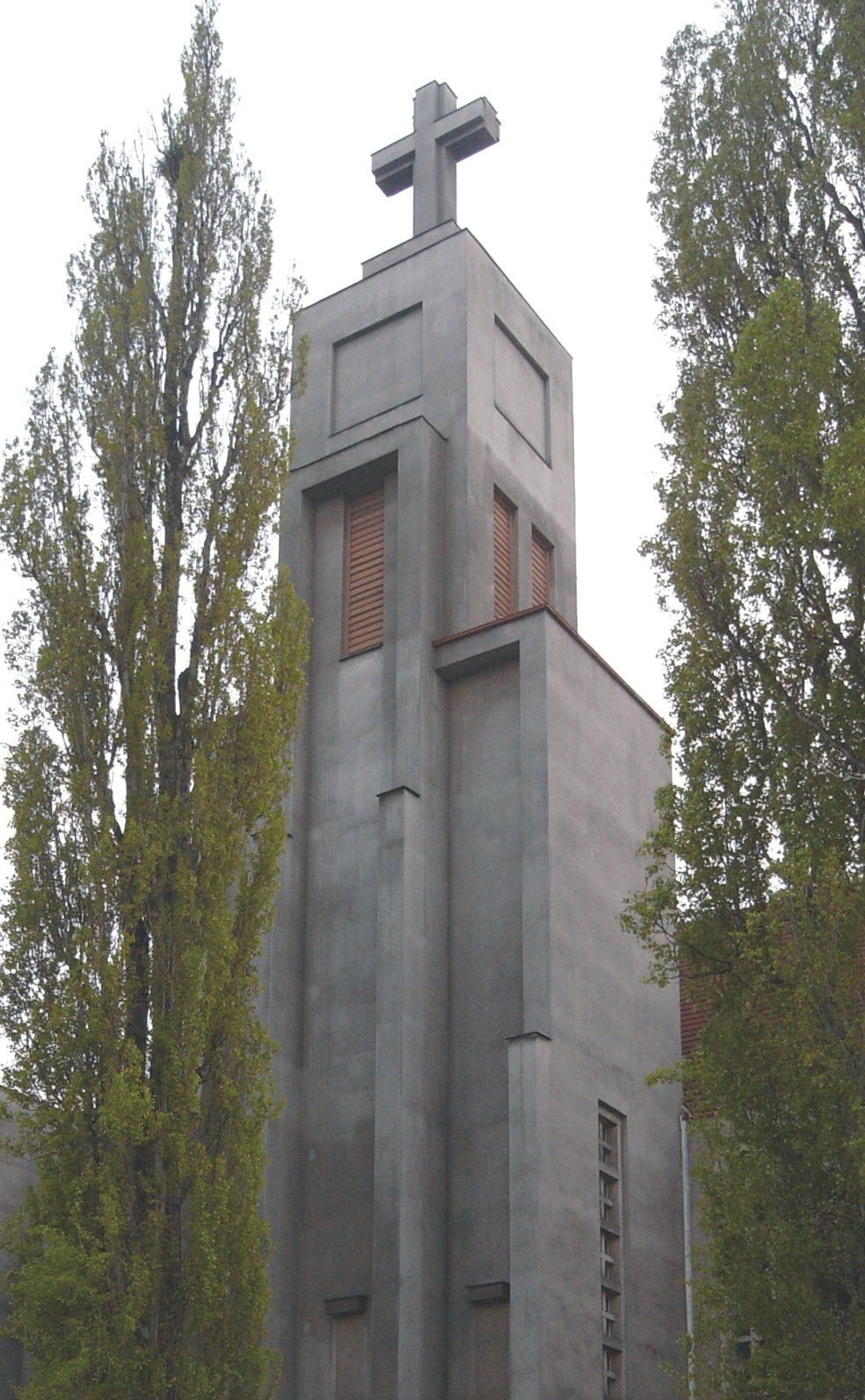 Kirche des Göttlichen Herzen des Herrn, 1932 (Hradec Králové, Tschechische Republik)